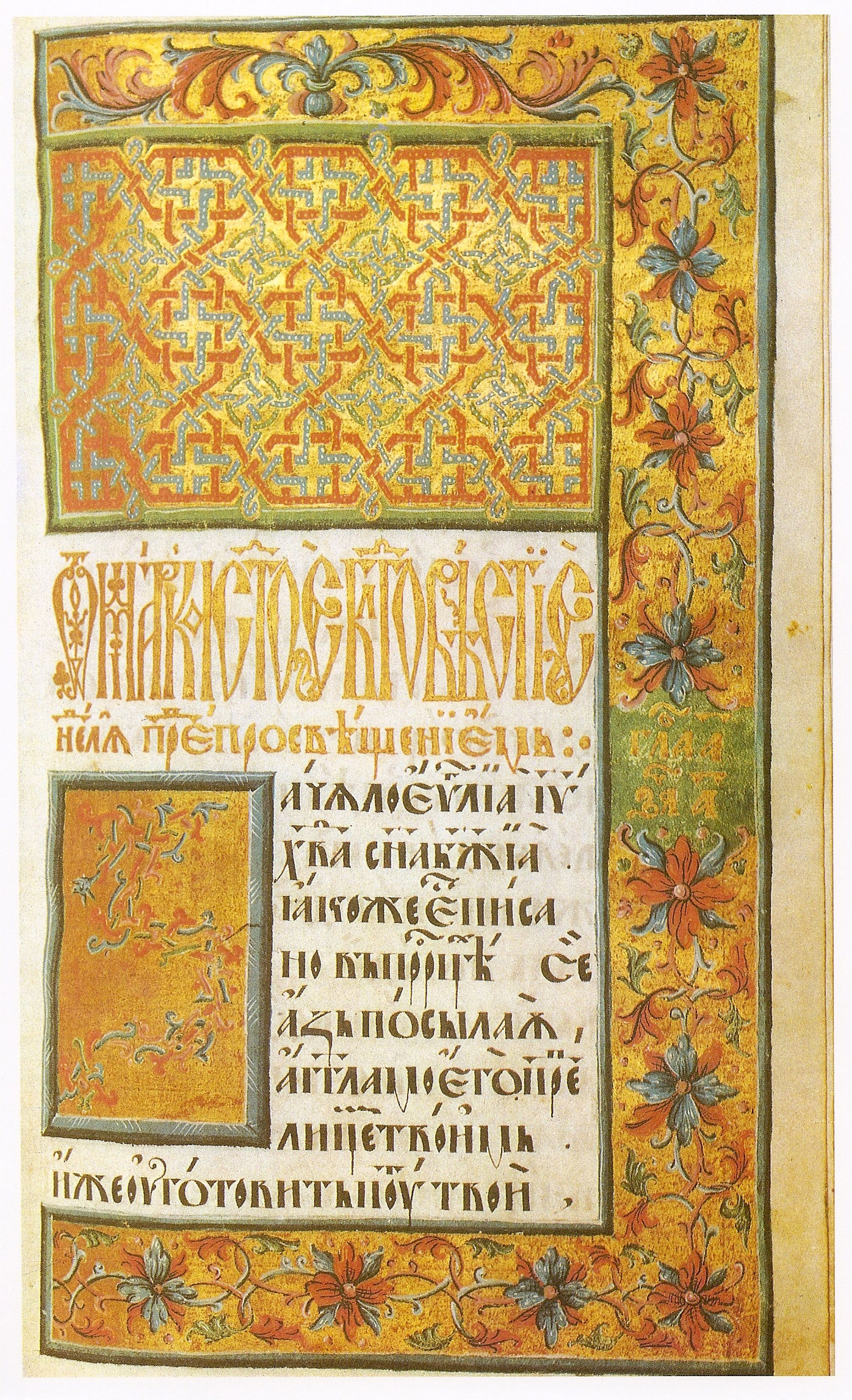 Пересопницьке Євангеліе. Початок Євангелія від Марка (арк. 129).